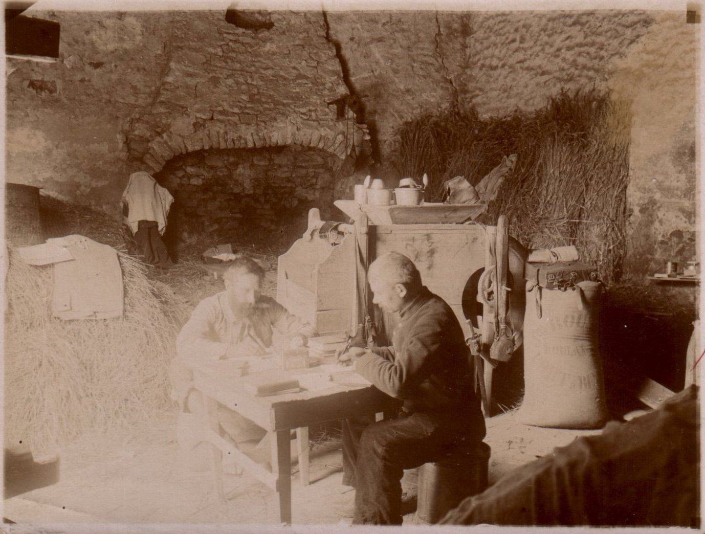 Eŭgeno Adamo kaj pastro Lecomte studantaj dum la unua mondmilito.